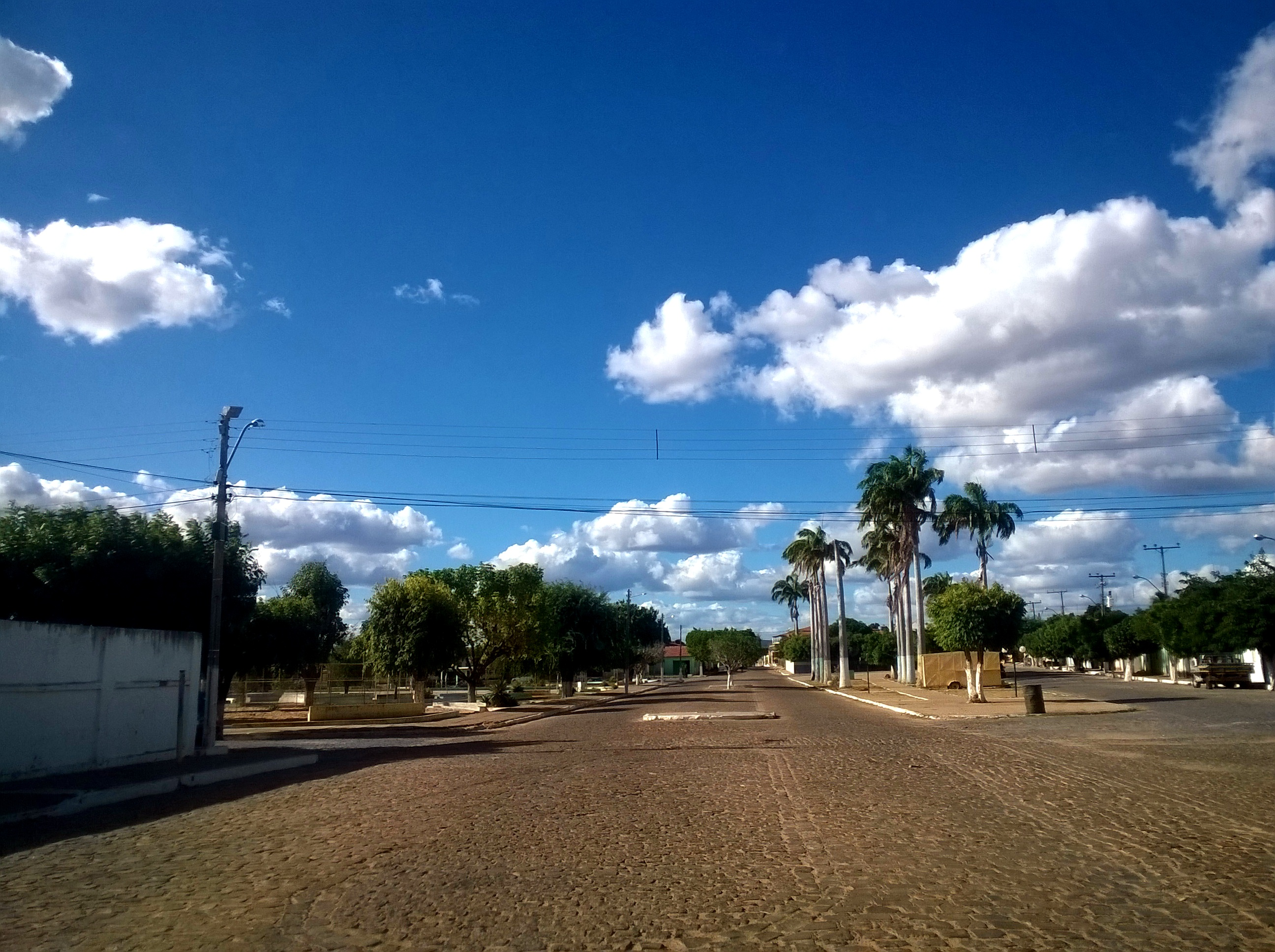 Rua Benjamin Constant, no município de Paratinga, na Bahia.